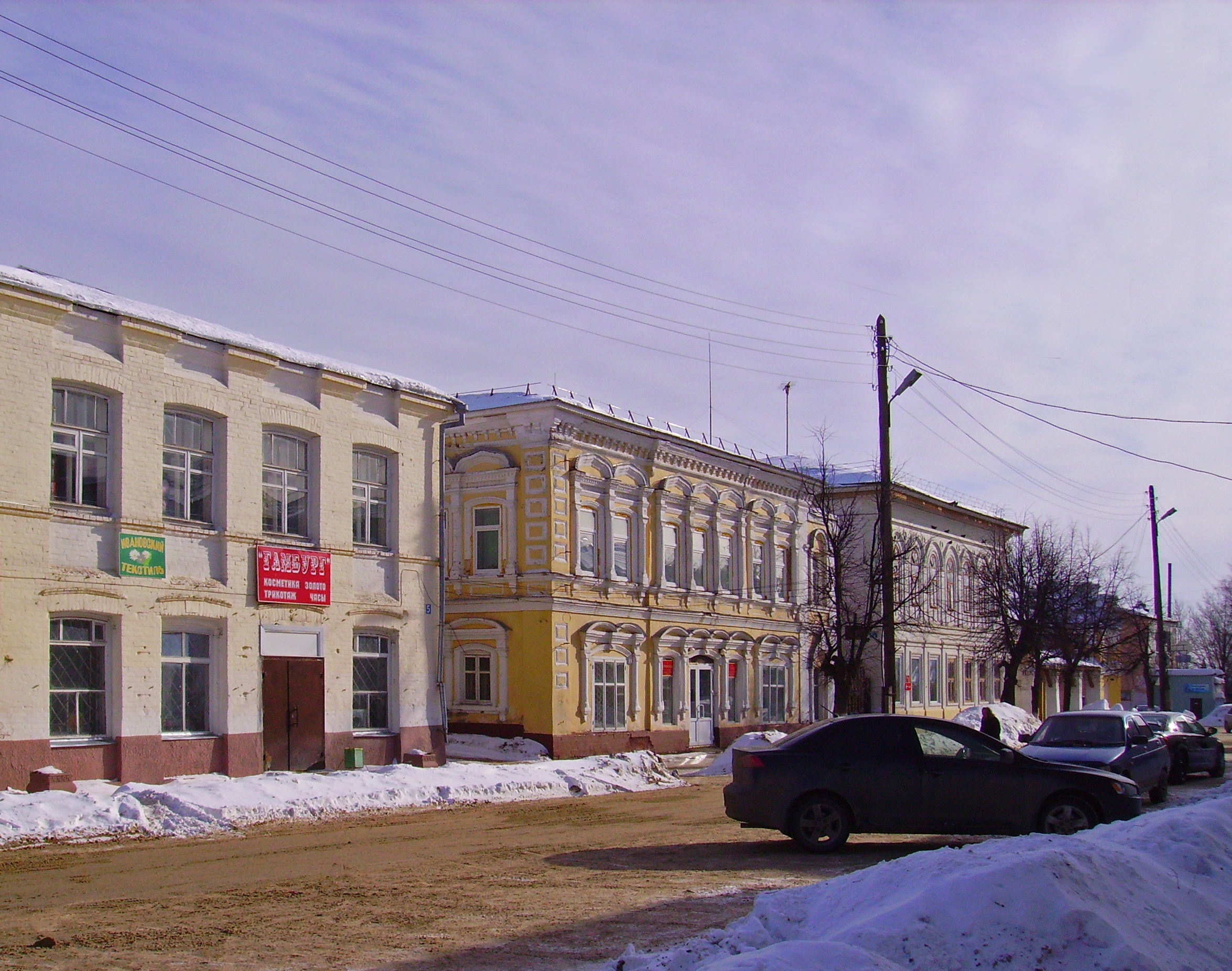 Ветлуга. Историческая застройка в начале улицы Ленина.